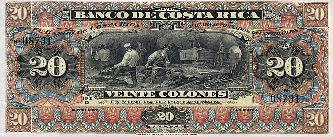 20 колонов. Коста-Рика. Аверс. Шахтёры.